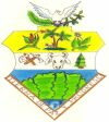 escudo del municipio de galan santander